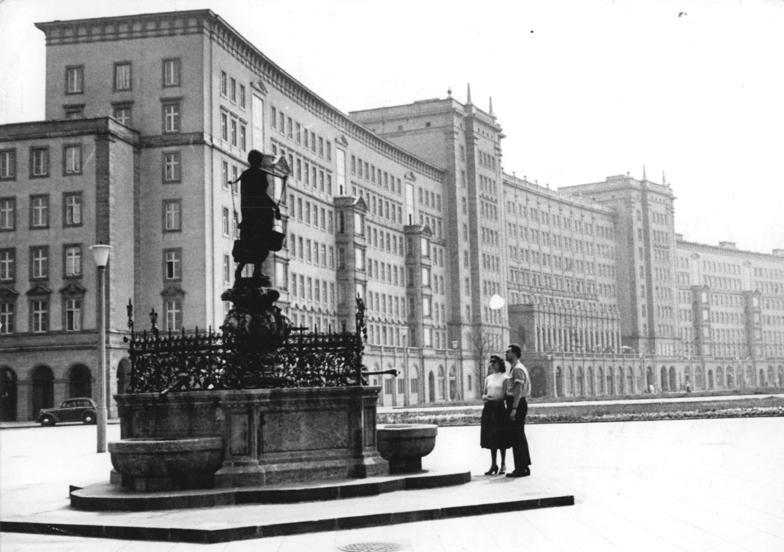 Leipzig, Leipziger Ring, Ringbebauung Zentralbild Leipzig-Weiß We-Th 15.6.1956 Das neue Leipzig UBz: Blick auf die neuen Wohnhäuser am Leipziger Ring.